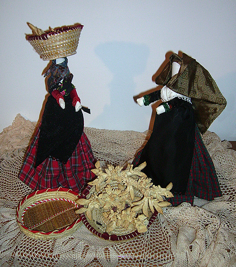 Pippiasa de Canna Bamboline di canna Bamboline con il corpo di canna rivestite con l'abito tradizionale del paese; sono tipiche della zona del Sulcis. Anticamente venivano utilizzate come bambole per giocare, rivestite di stacci e con i capelli fatti di lana grezza.